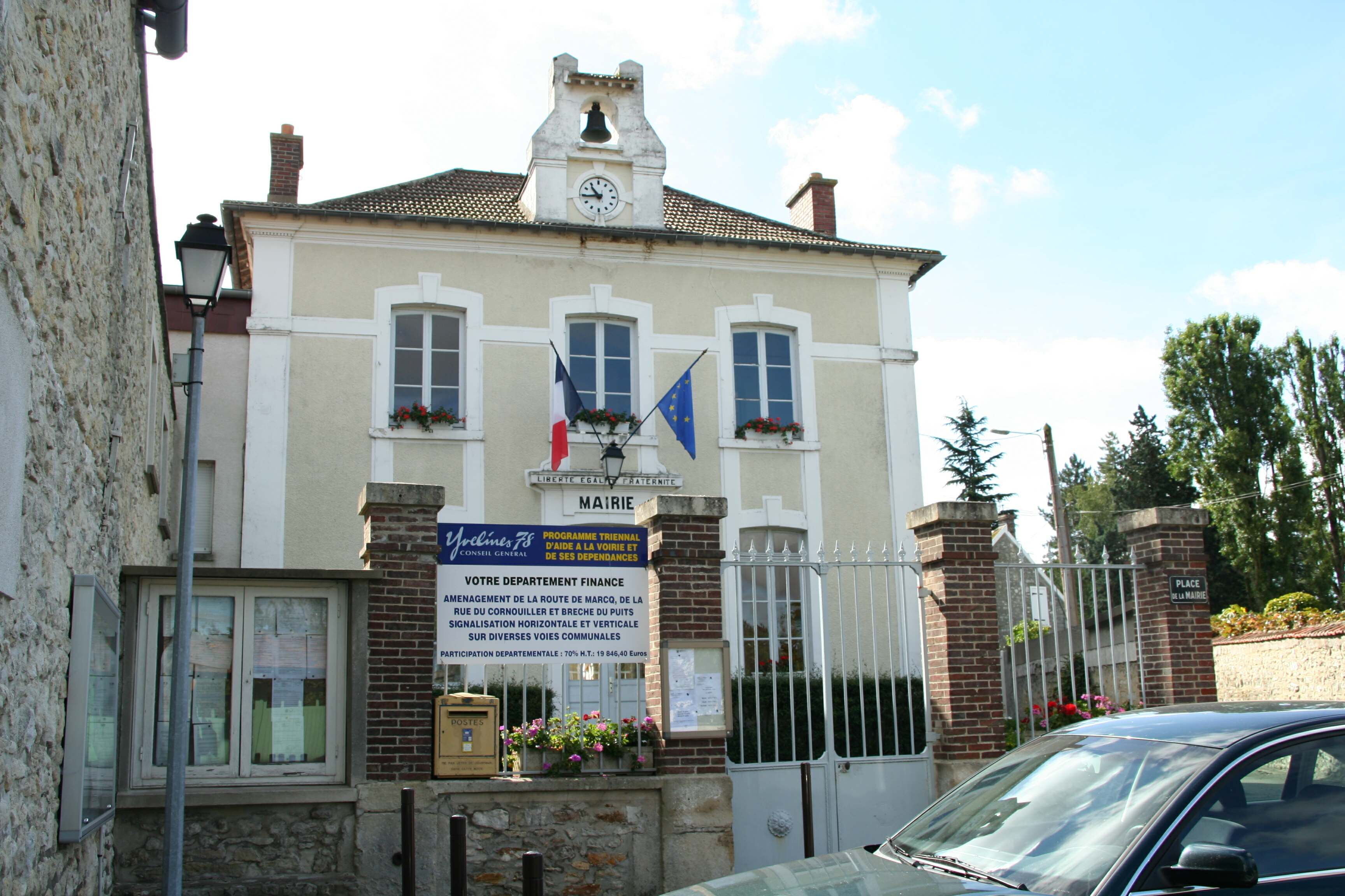 Mairie d'Andelu, Yvelines (France)